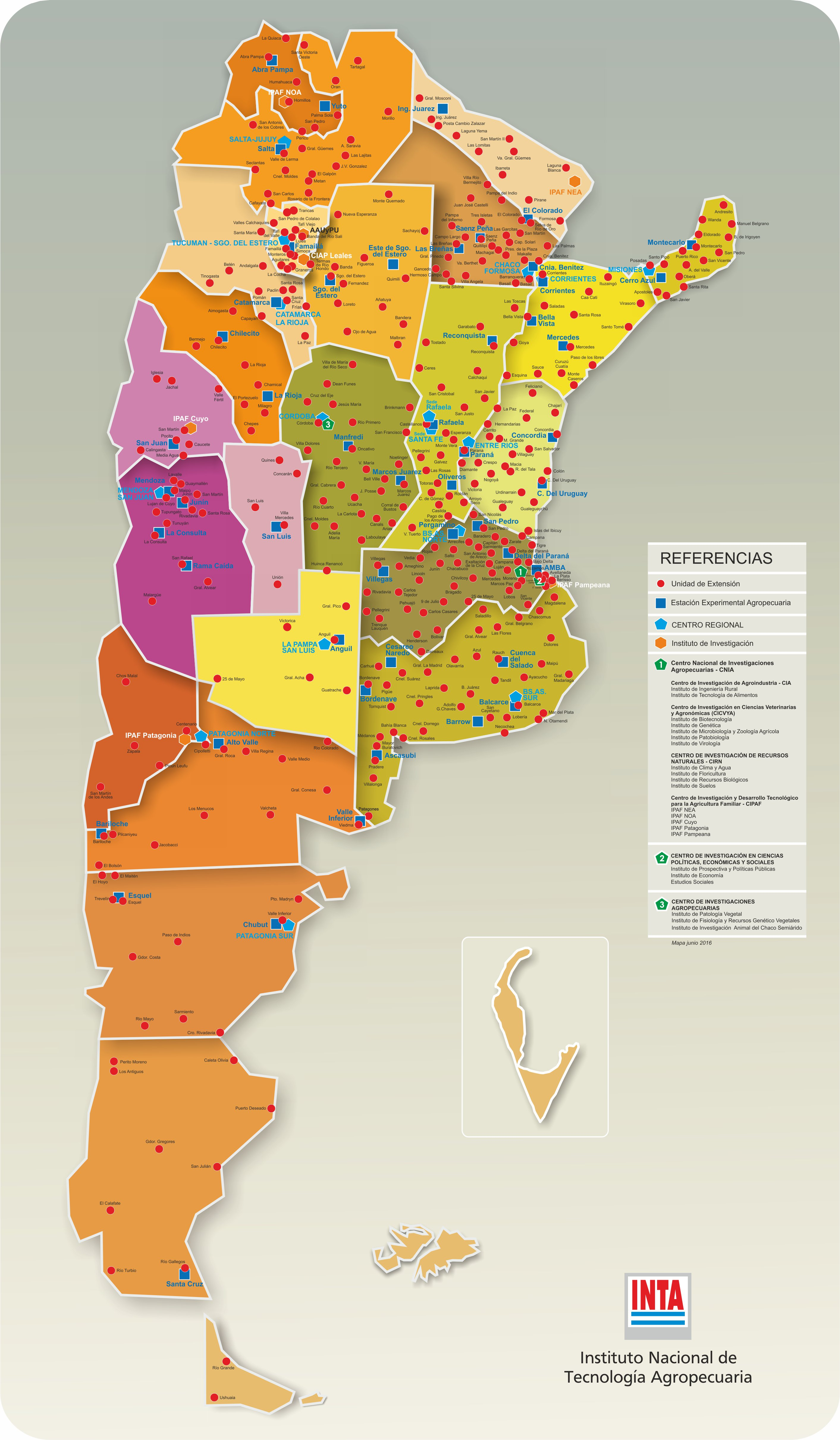 Mapa de sedes INTA